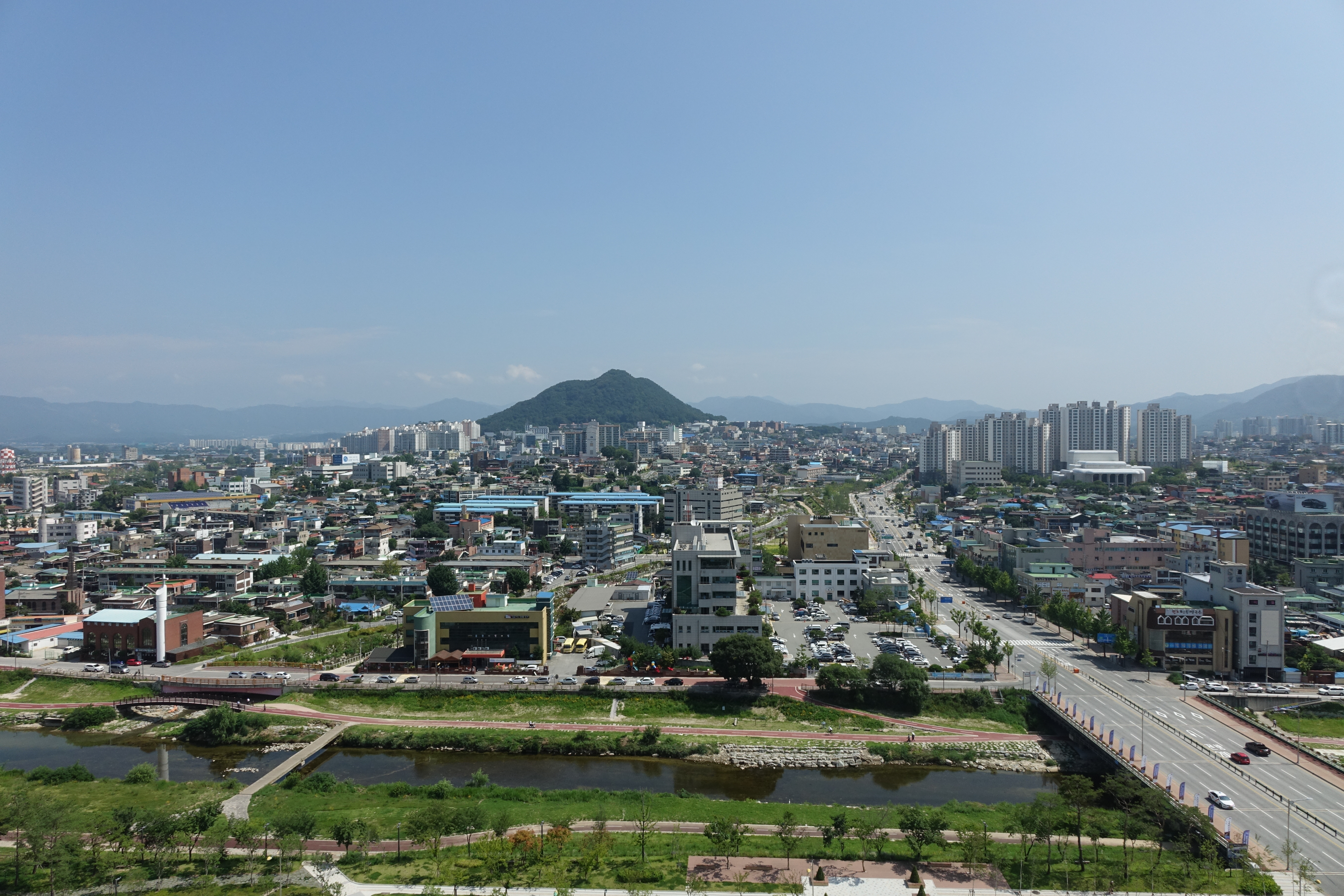 최광모 촬영 사진 (Photos taken by Choe Kwangmo)